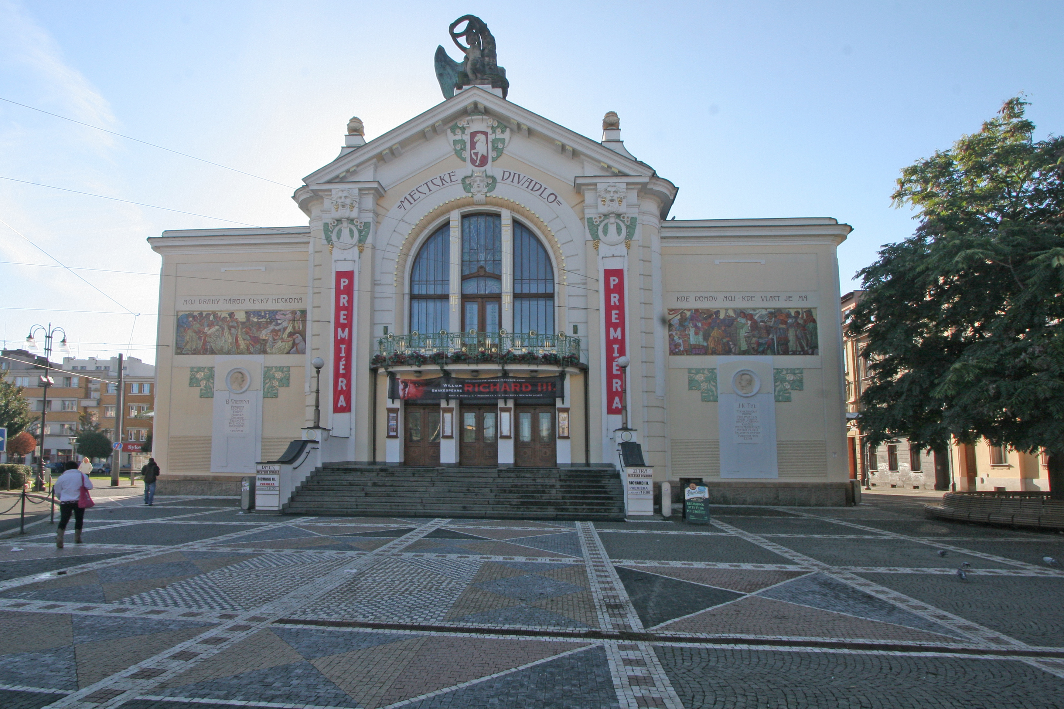 Městské divadlo, nám. Republiky 50, Pardubice